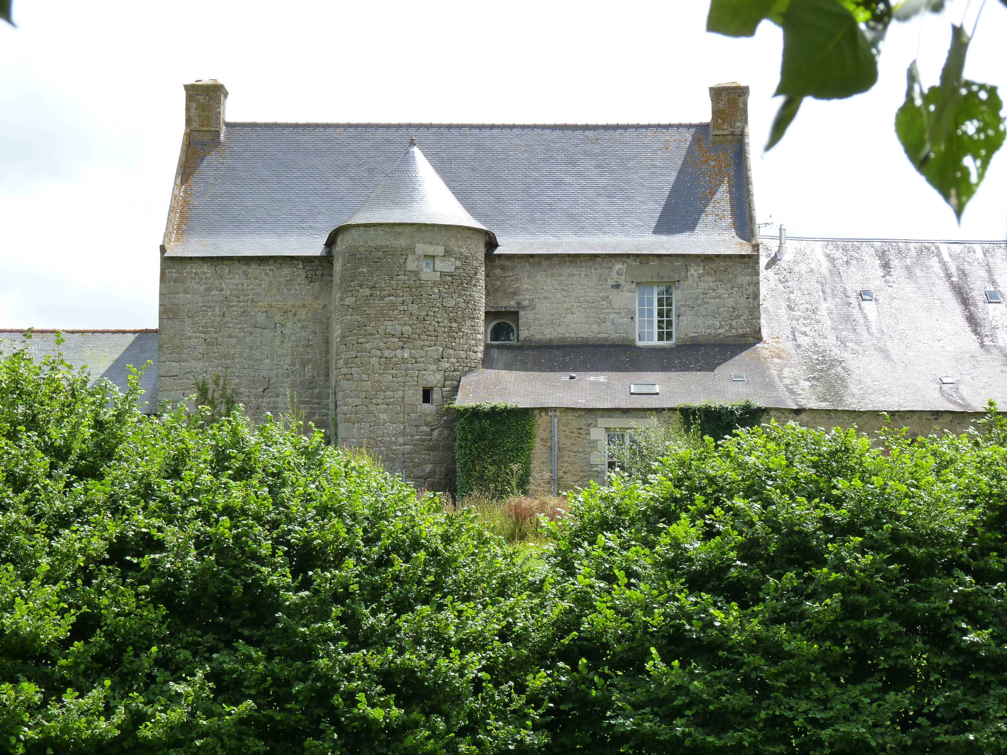 Vue arrière (de la route).